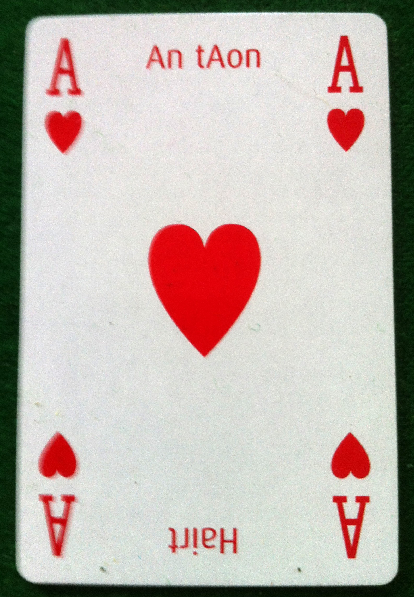 Cártaí Imeartha - an tAon Hart.